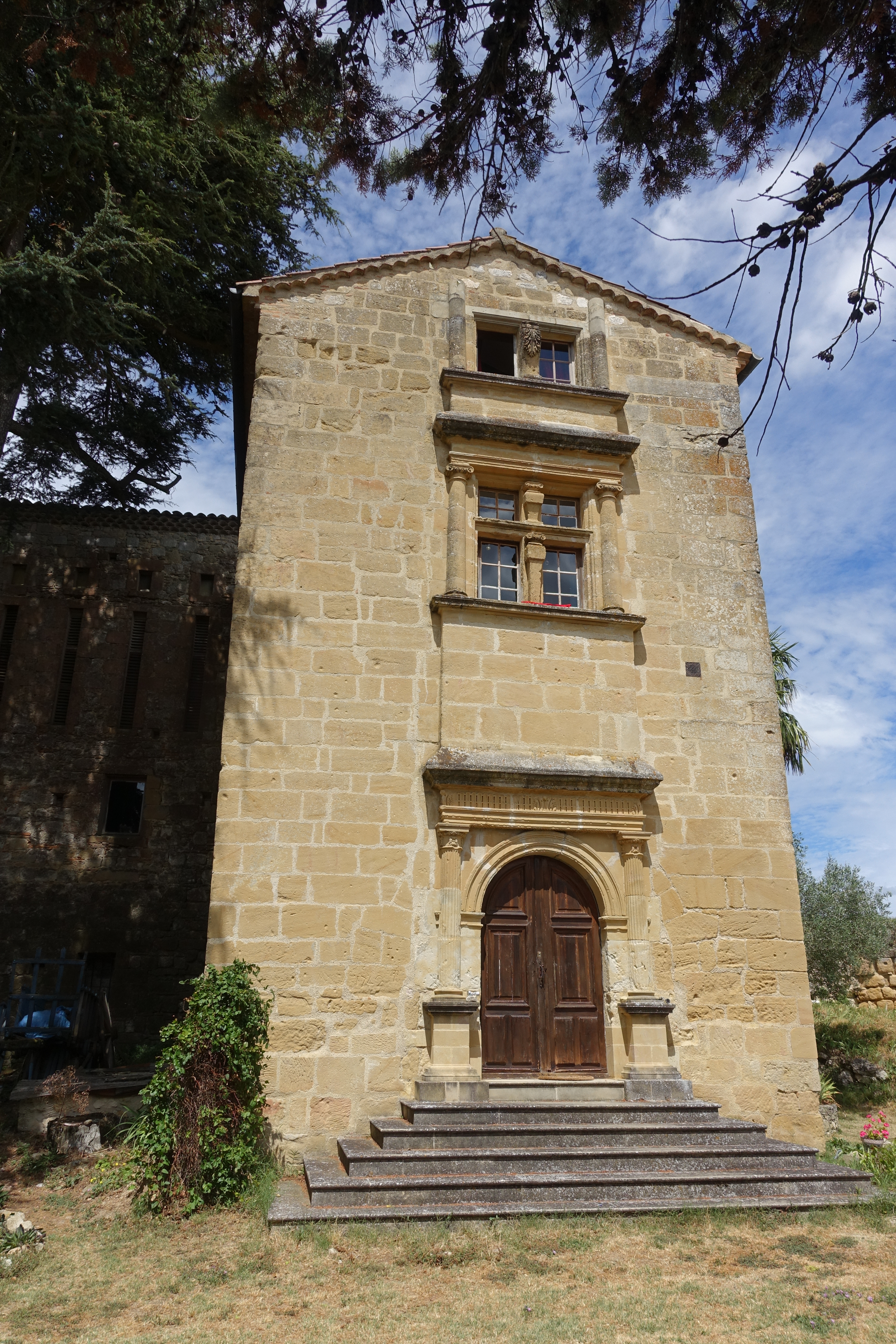 facade renaissance et séchoir à pastel (à gauche) du chateau de Magrin